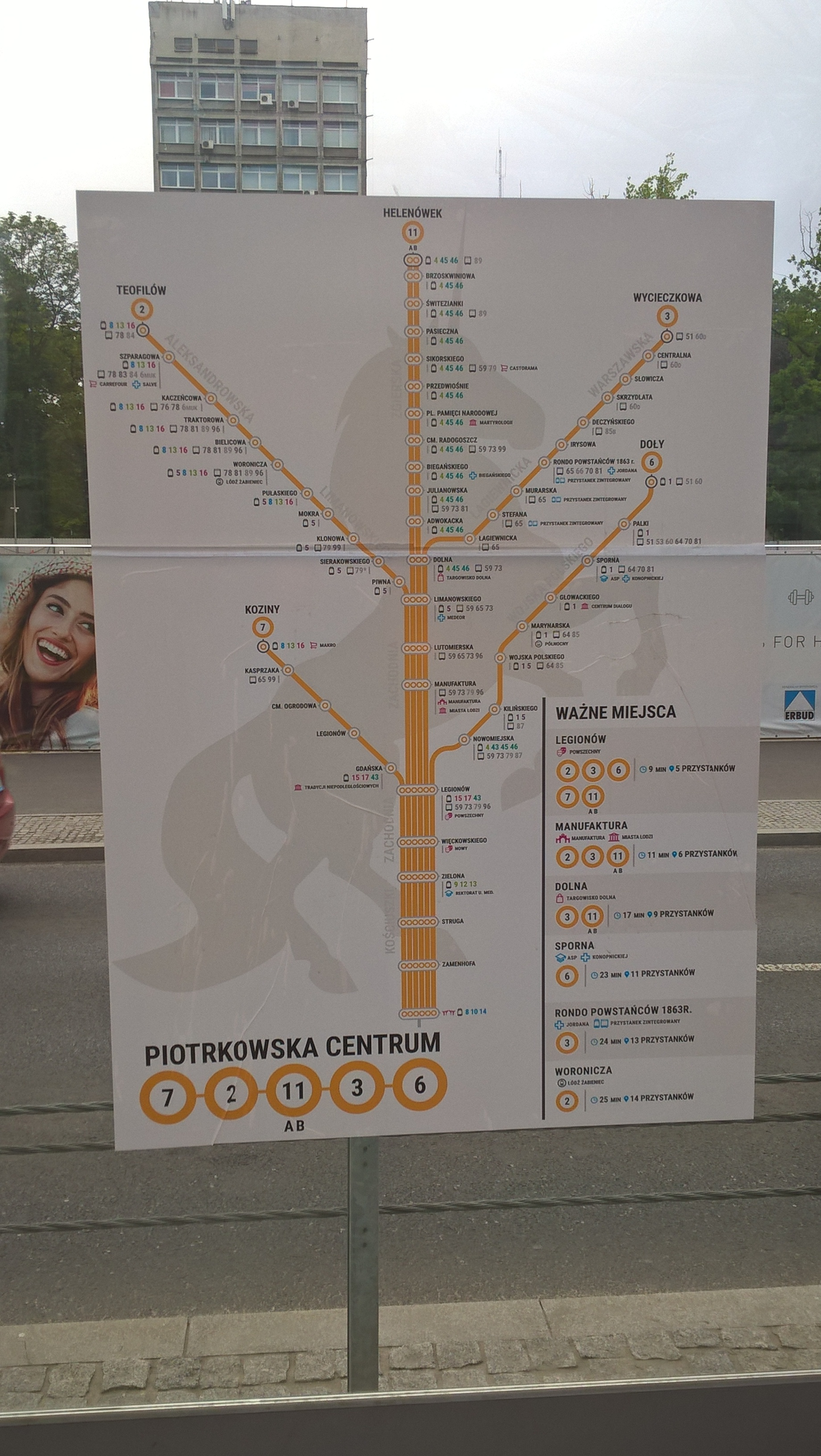 Informacja pasażerska MPK-Łódź na trasie WZ (Dworzec Tramwajowy Centrum), w postaci mapy linii tramwajowych. W tle wizualizacja jednorożca, w związku z potoczną nazwą dworca - Stajnia Jednorożców.